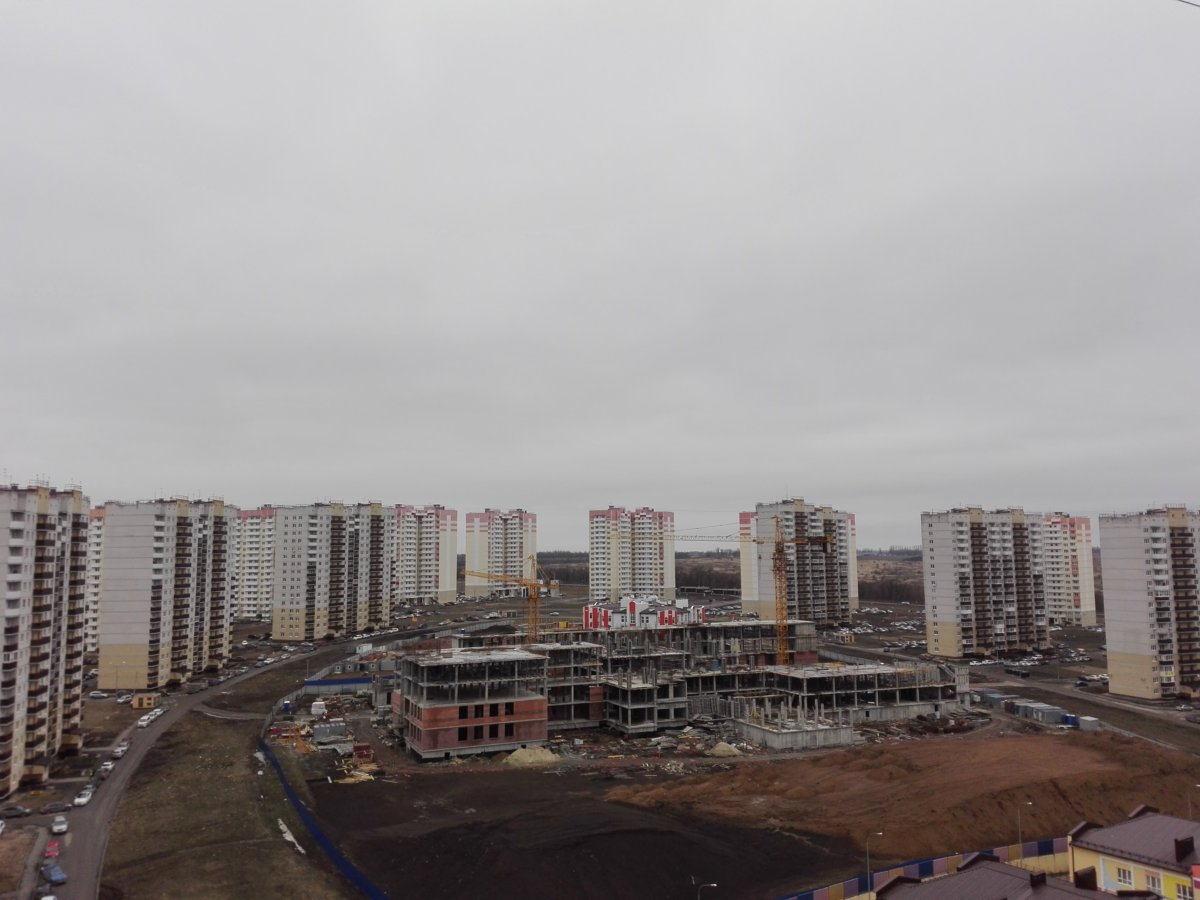 Строящиеся детски сад и школа ЖК Суворовского.